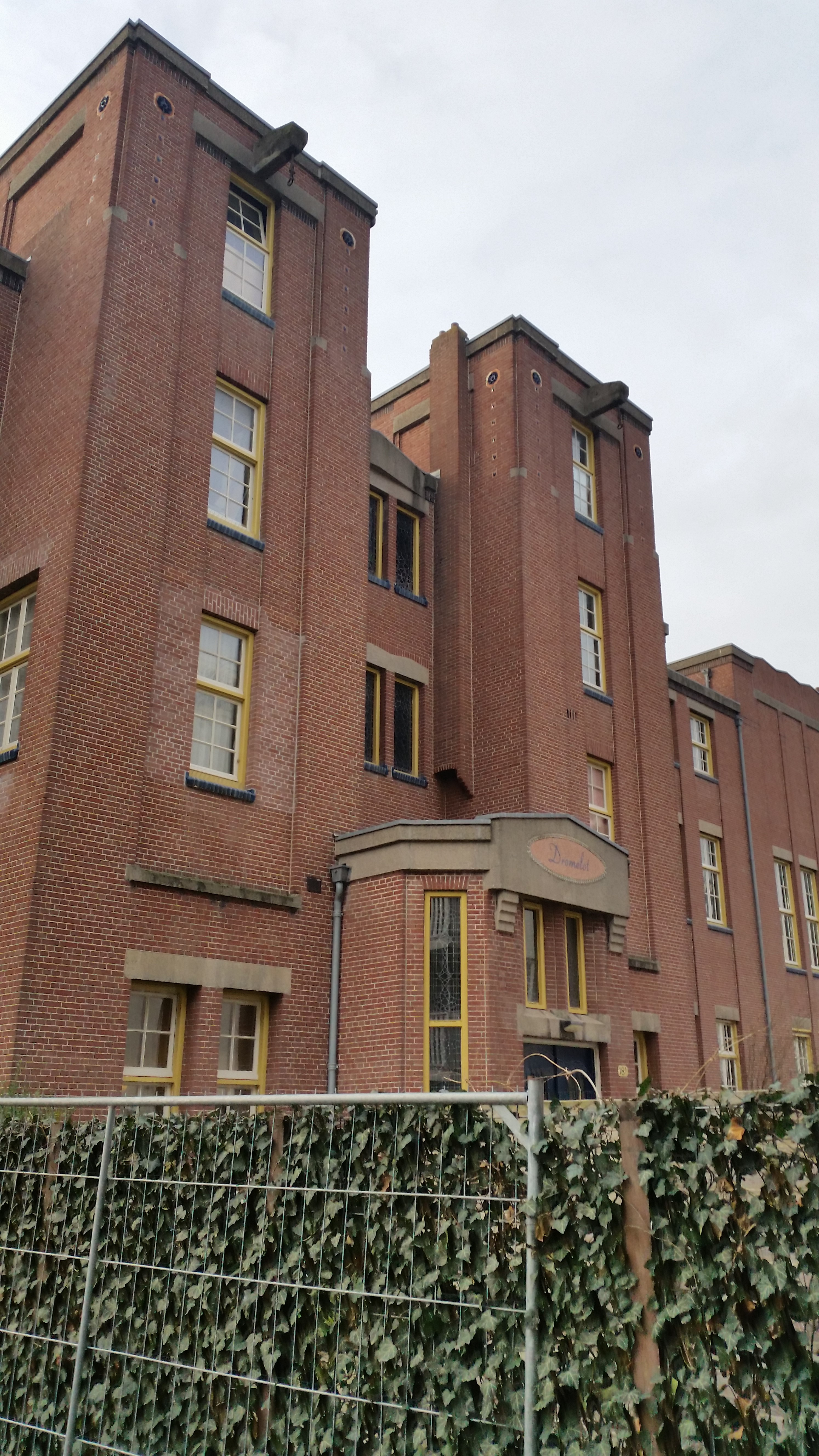 Voorgevel van 18a aan de Frederiksstraat, Amsterdam